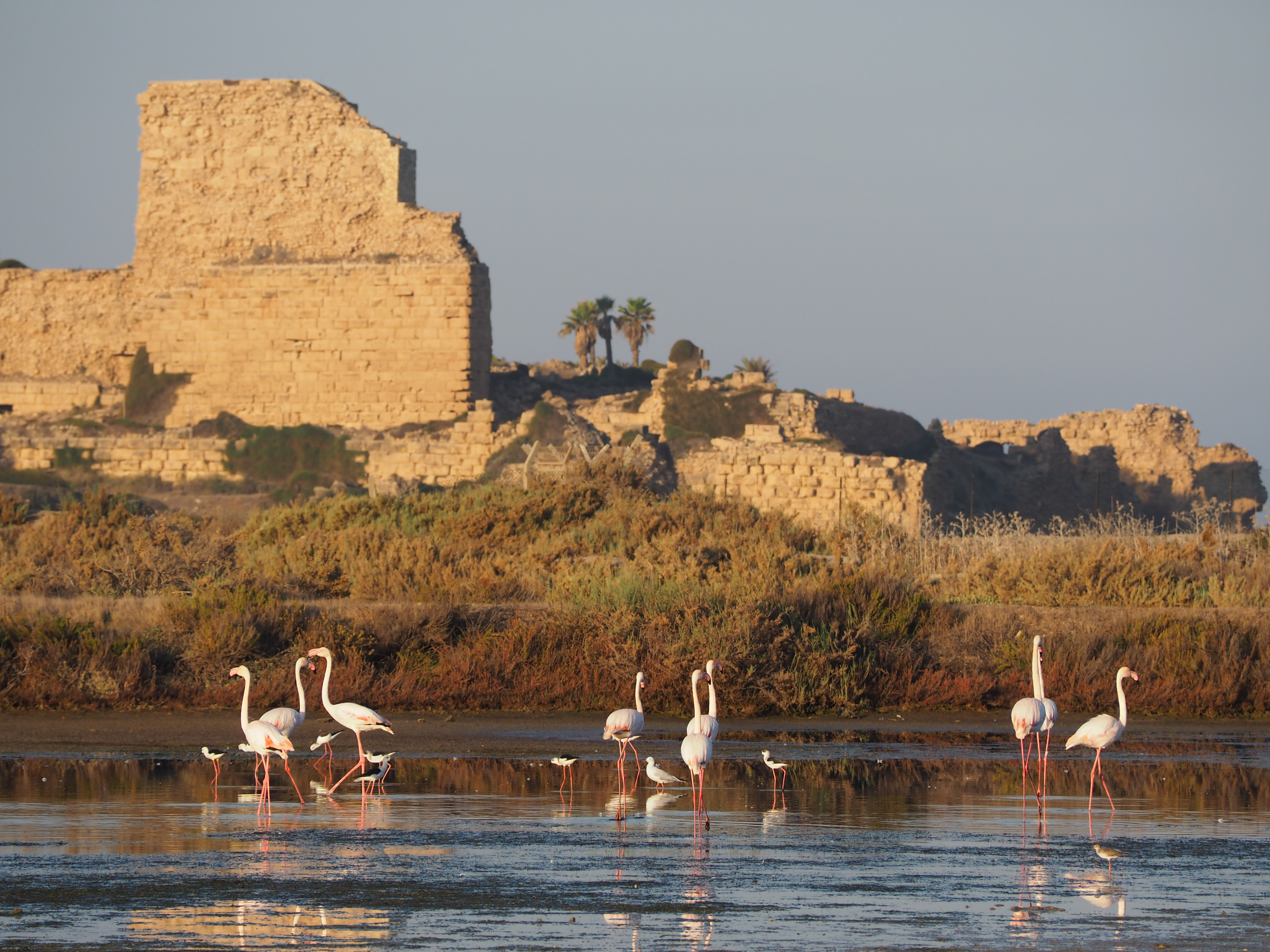 מבצר עתלית (ידוע גם כמבצר פרגרינורום (Castellum peregrinorum) או טירת פֶּלֶרֶן (Château Pèlerin)) הוא אתר ארכאולוגי ובו מבצר צלבני. האתר נמצא סמוך ליישוב עתלית שבמישור החוף, והוא היה מקום מושבם של אחרוני הצלבנים בארץ ישראל, לפני שנטשו את ממלכתם והפליגו אל מעבר לים.